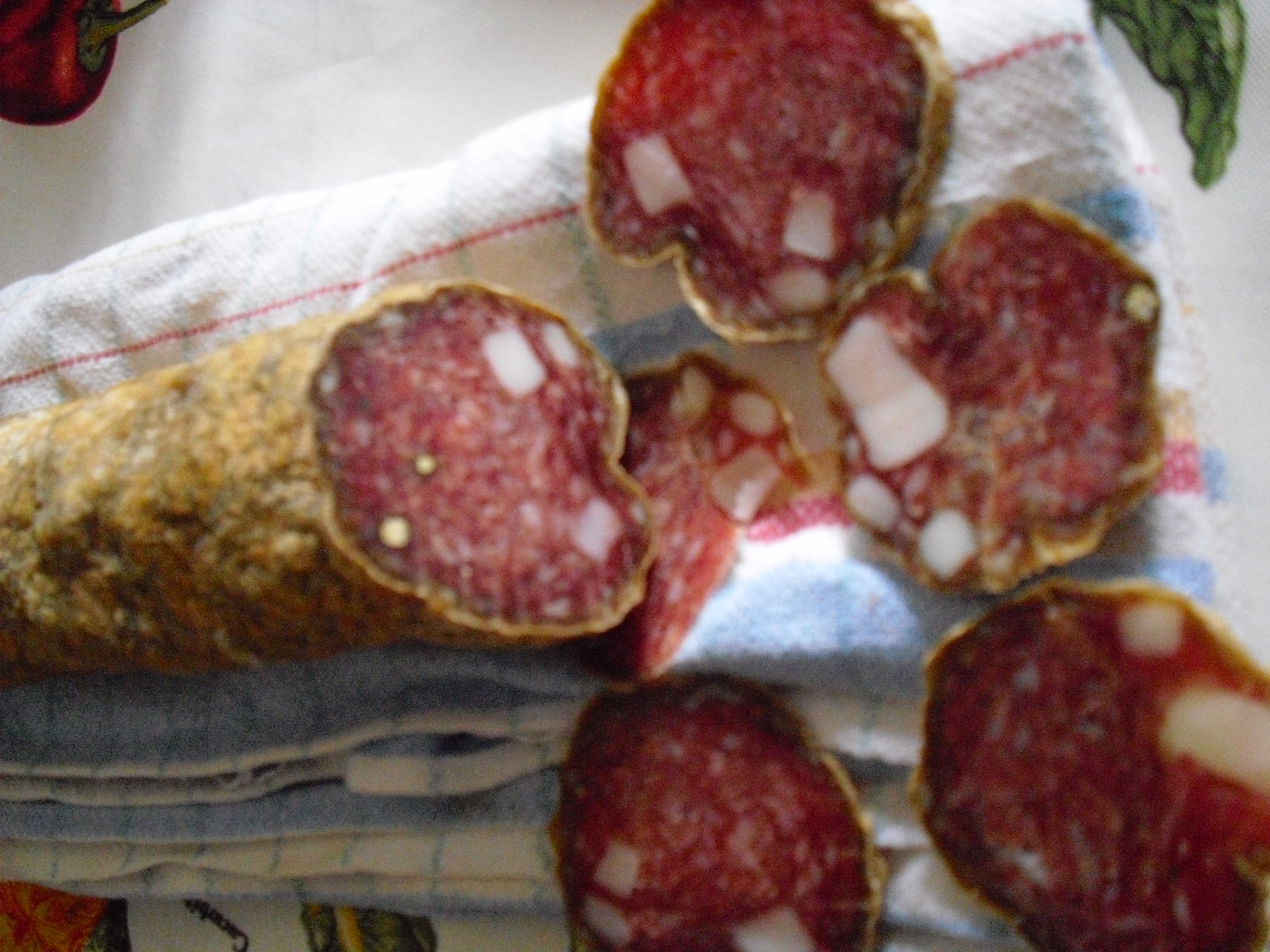 Salume tipico dell'entroterra marchigiano; proveniente dall'omonima città